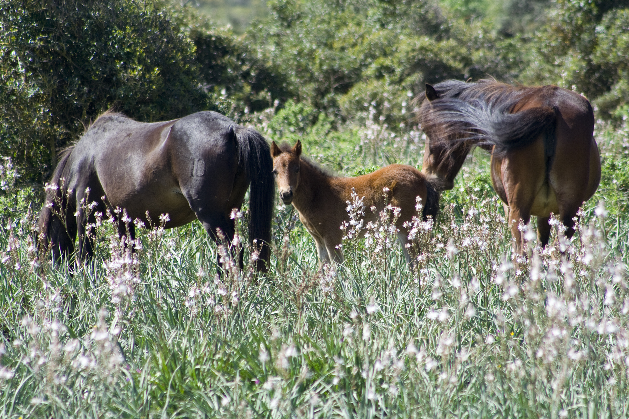 Cavallini della Giara in un prato di asfodelo